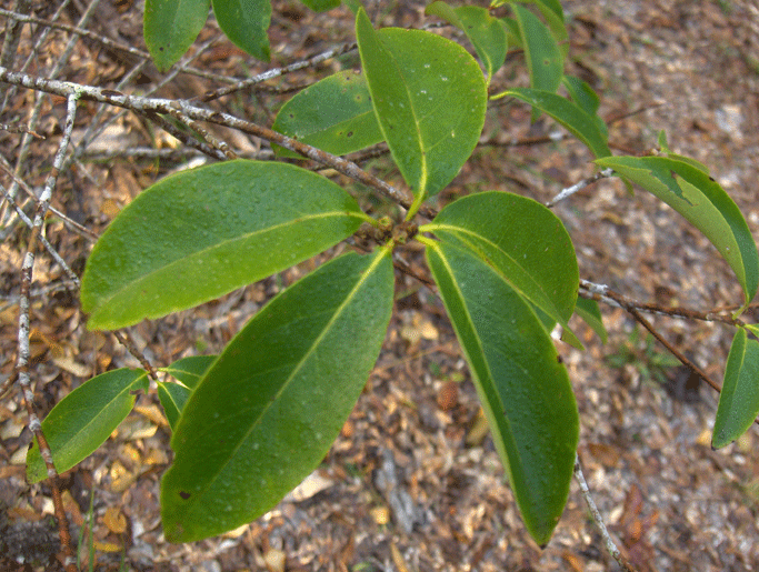 Marlberry